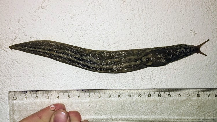 Limax Maximus (Tigerschnegel) an einer Hauswand in Rheinland-Pfalz, Deutschland. Die Länge beträgt ausgestreckt ca. 20 Zentimeter (Lineal zur Verdeutlichung).